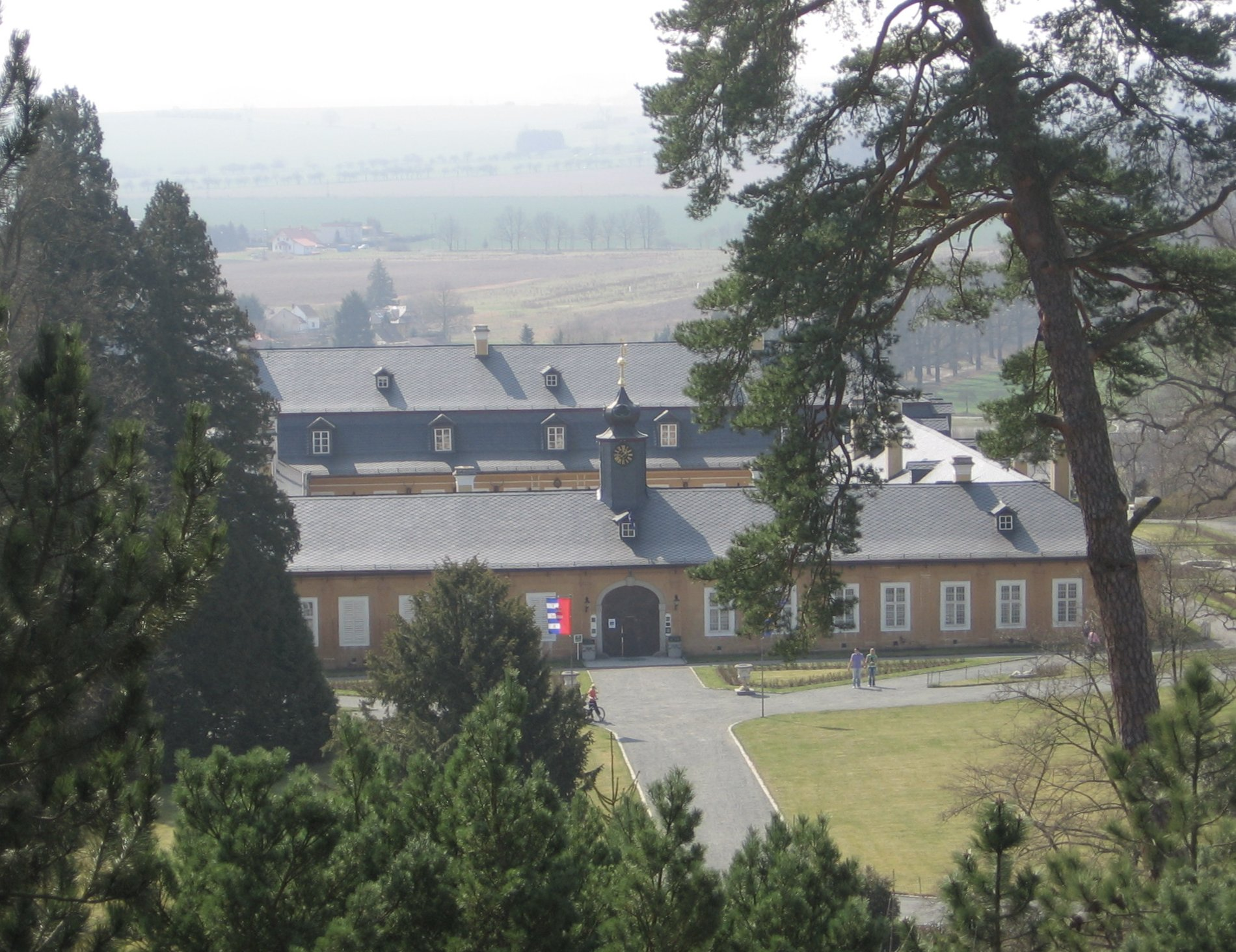 Zámek Kozel, pohled shora z blízkého svahu v zámeckém parku